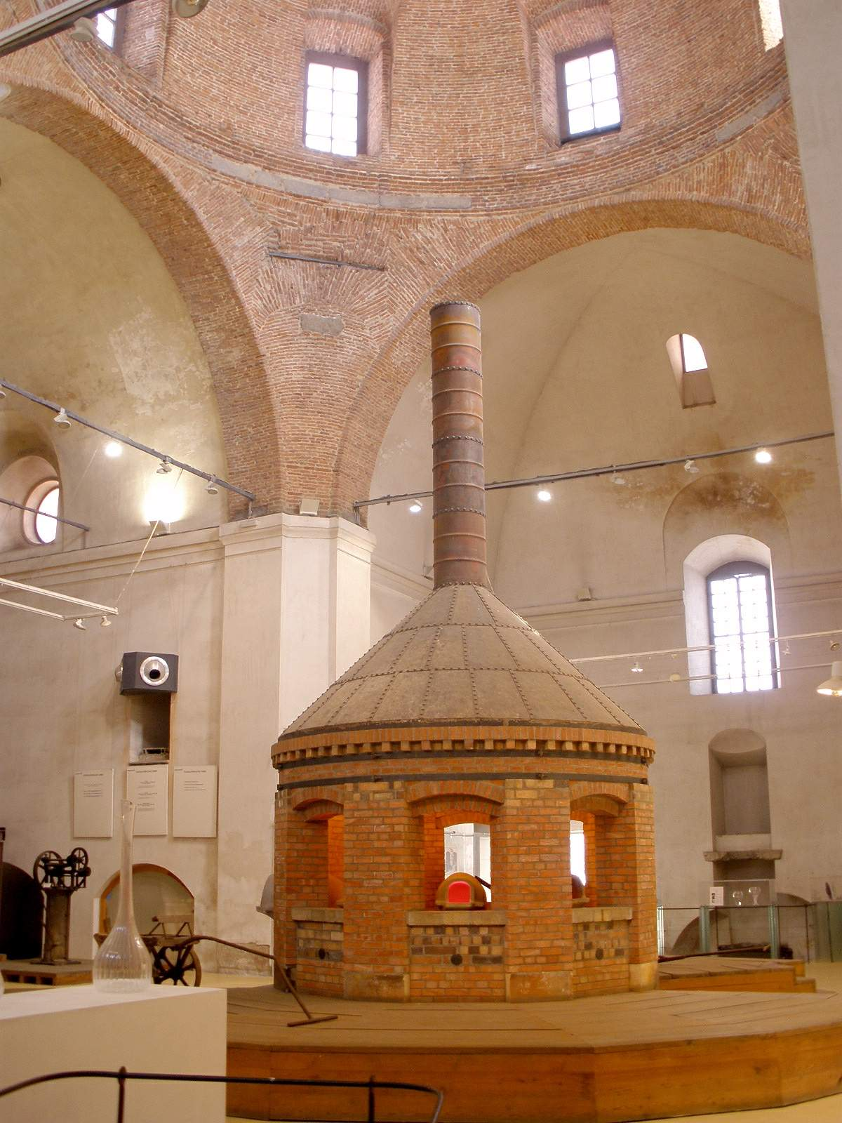 Real Fábrica de Cristales de La Granja de San Ildefonso. Espacio central de la fábrica, cúpula y horno.